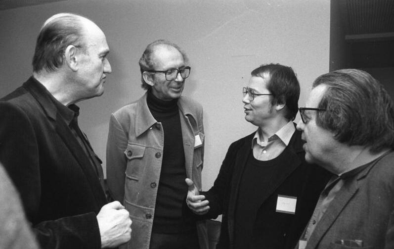 ADN/ZB/Senft/29/12/81 Berlin: An der "Berliner Begegnung zur Friedensförderung" von Schriftsstellern, Künstlern und Wissenschaftlern aus europäischen Ländern vom 13. bis. 14. Dezember 1981 nahmen Franz Fühmann, Alfred Wellm, Volker Braun und Erich Fried (v.l.n.r.) teil.